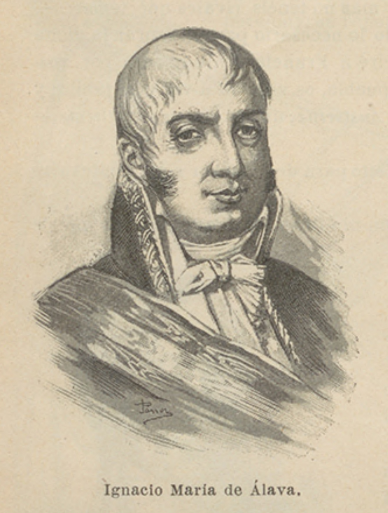 Ignacio María de Álava.